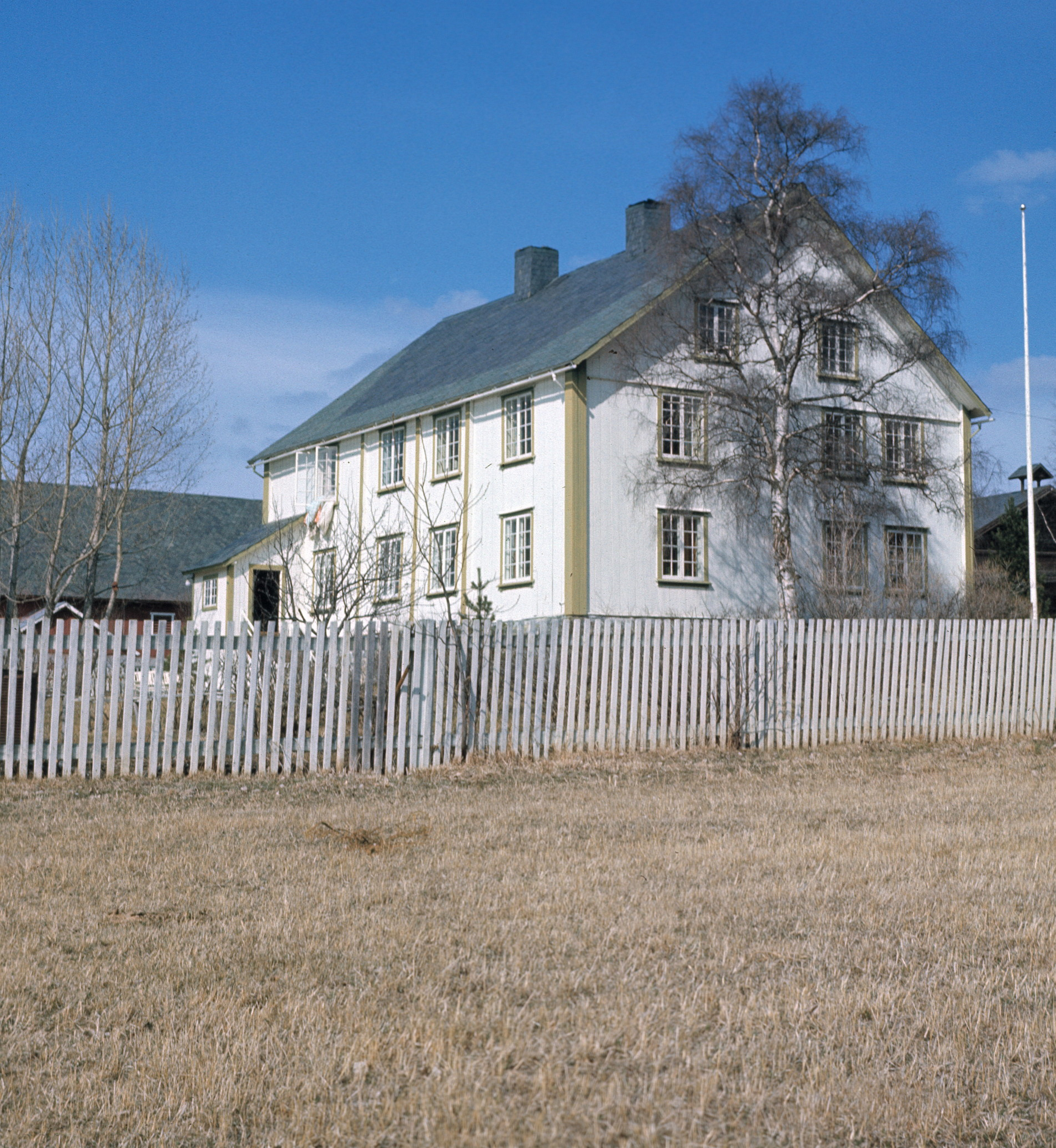 Vestre Slidre prestegård. Foto: Lars Hauglid. Fra Riksantikvarens Kulturminnesøk.